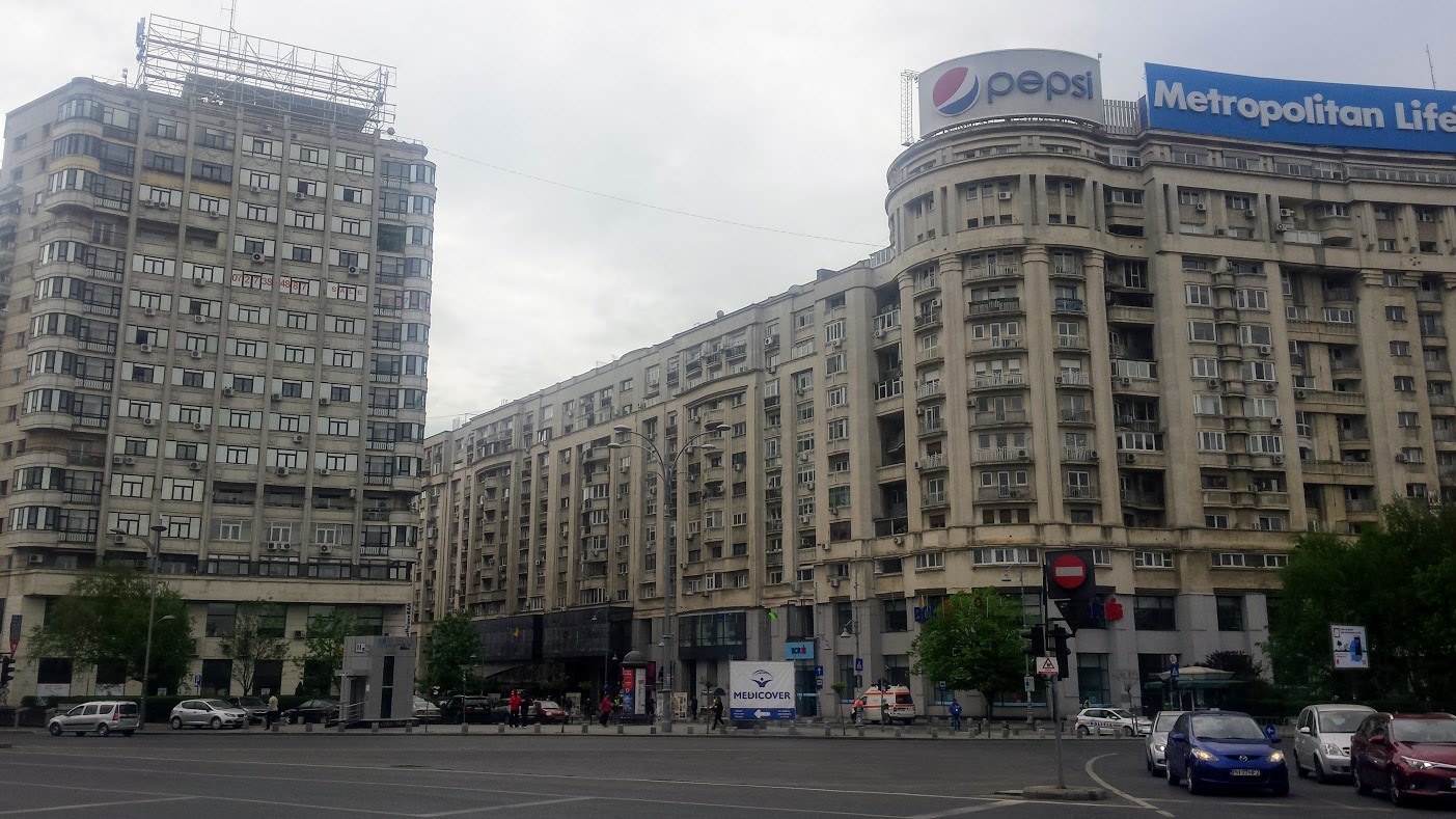 Blocuri Piața Victoriei, București.